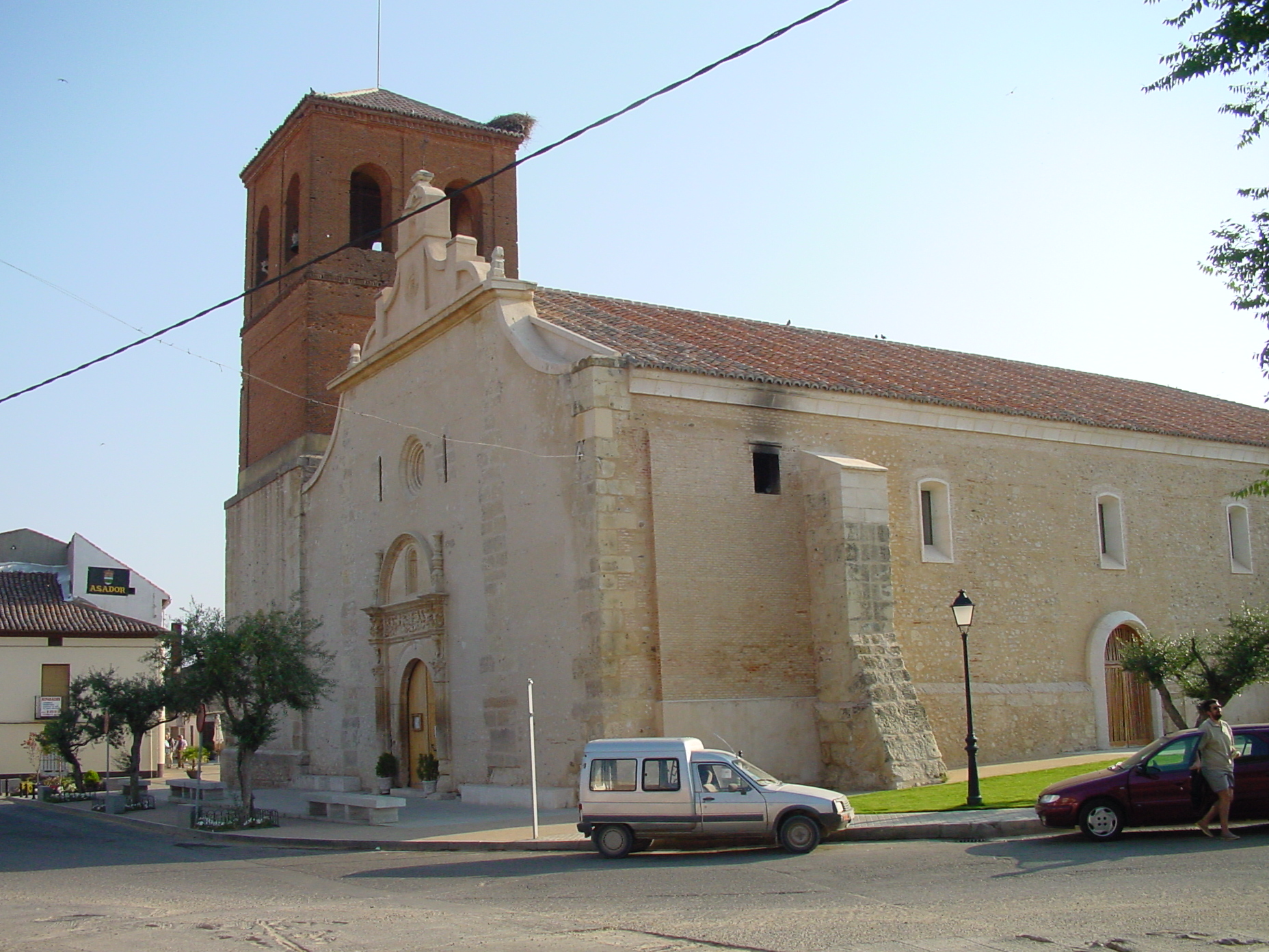 Iglesia en Valdetorres de Jarama.